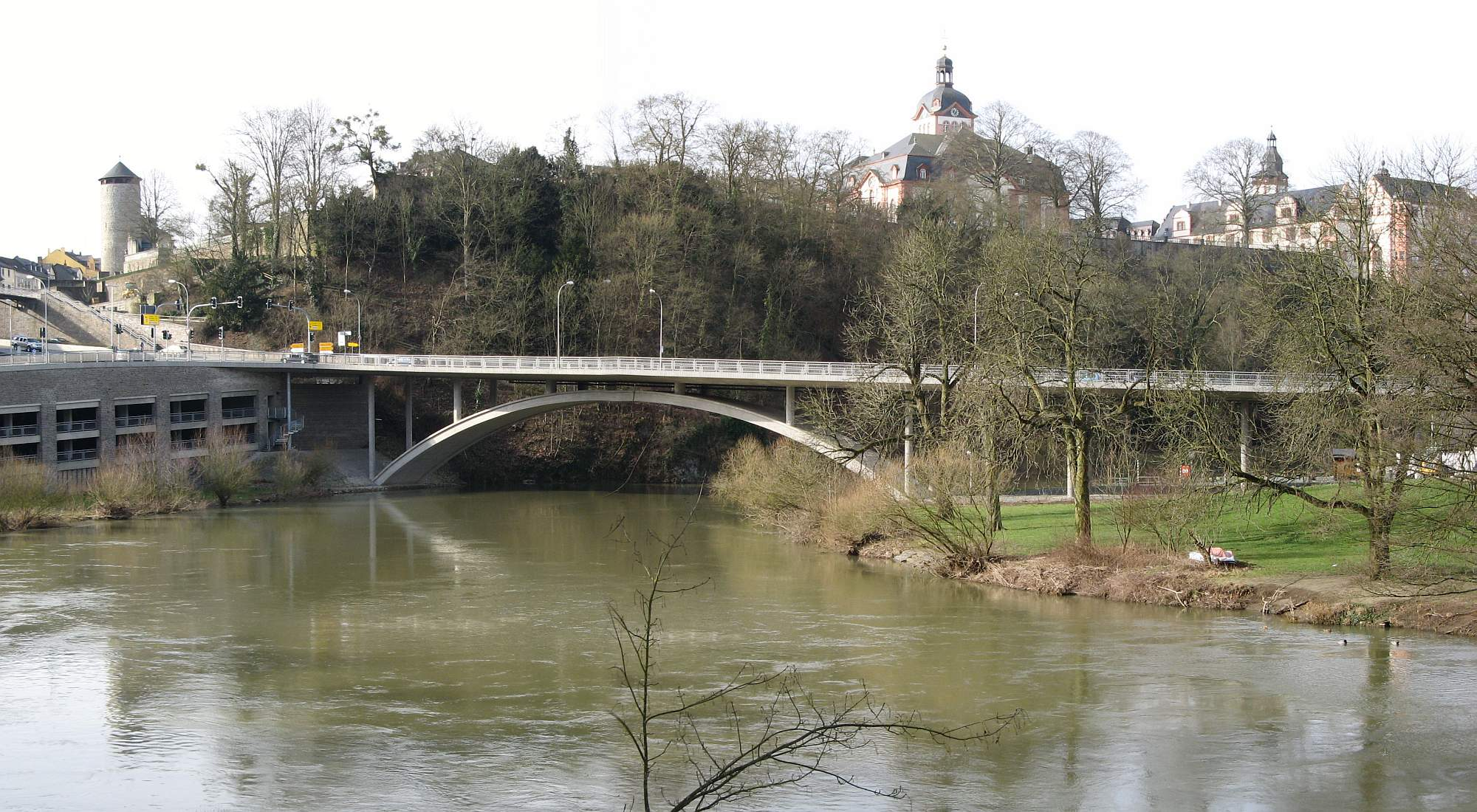 Oberlahnbrücke Weilburg im Zuge der B 456; Im Hintergrund ist das Schloss Weilburg zu erkennen